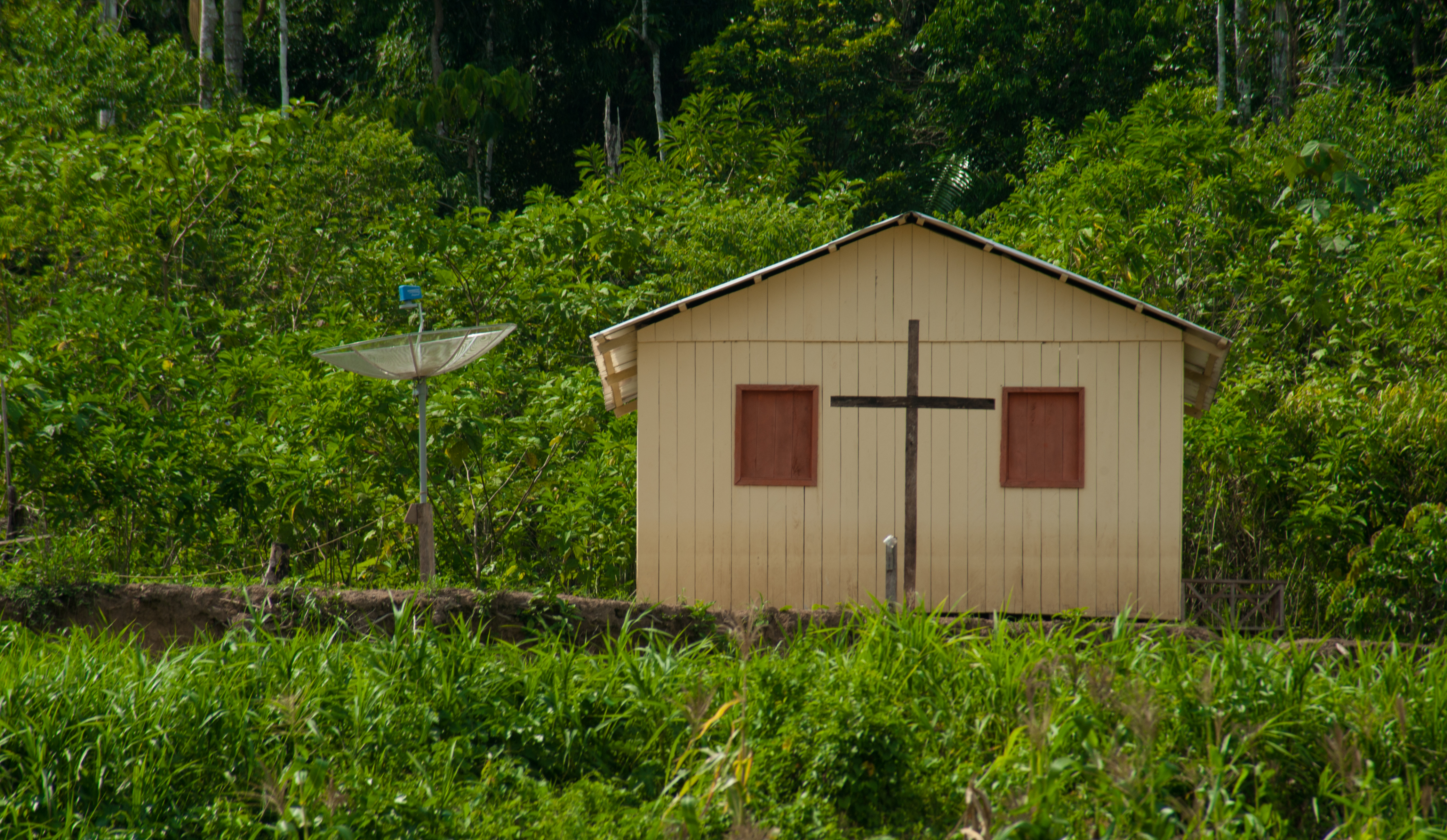 Margens do Rio Amônea Acre, Brasil © Pedro França/MinC